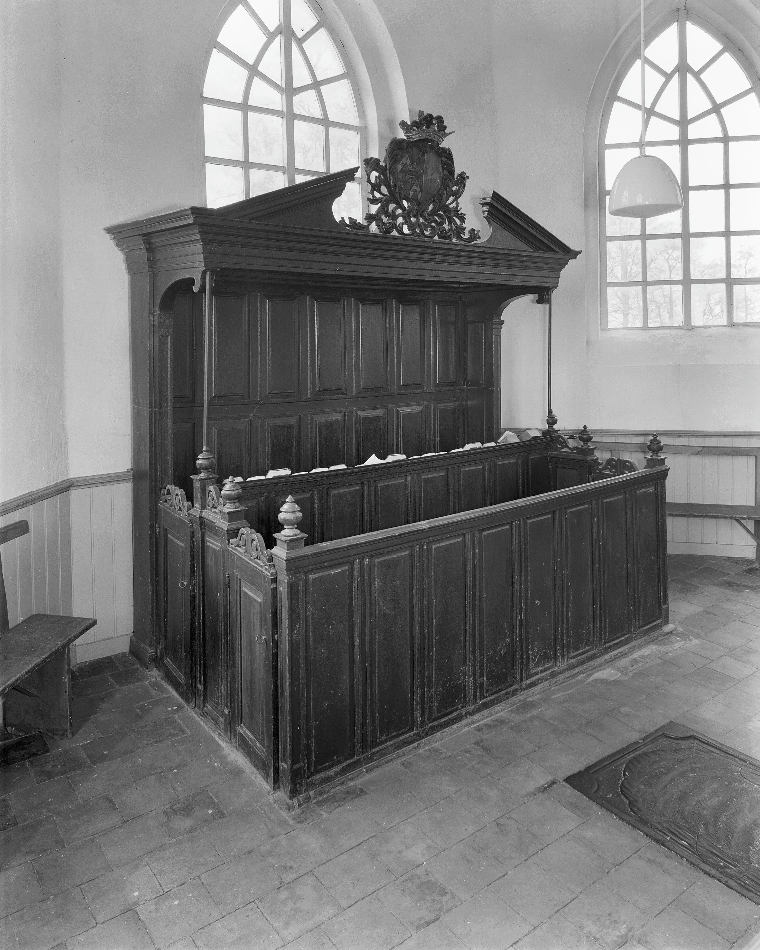 Nederlands Hervormde Kerk: Herenbank familie Fraeyelema